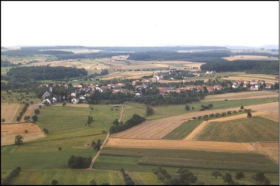 Luftaufnahme von Oberesch, Saarland, Germany Fotograf: Christian Zimmer